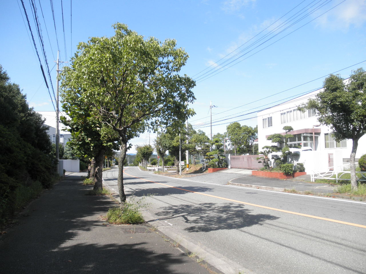 三木市別所町巴